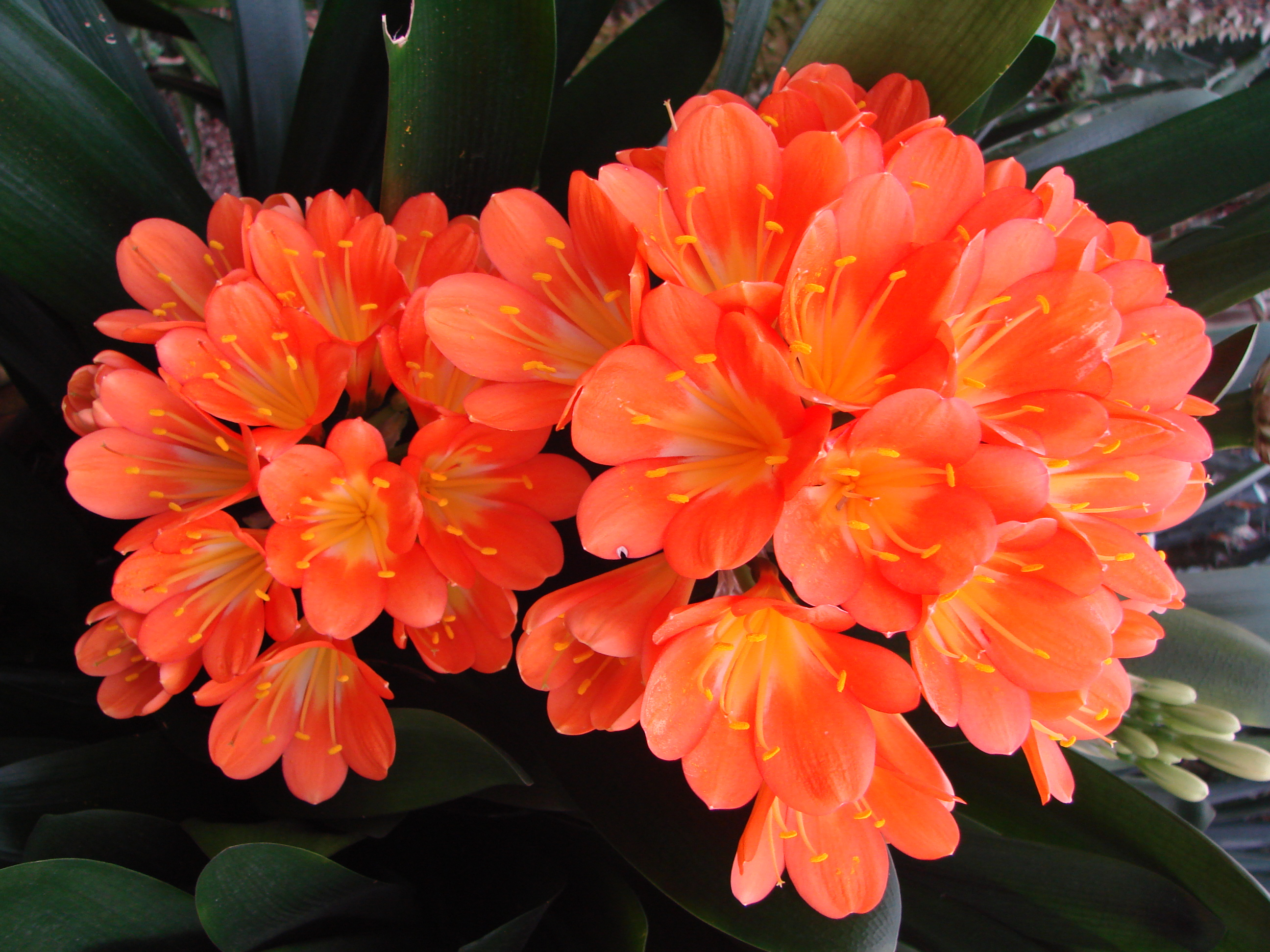 Jardin botanique de l'Université de Zurich (Suisse) : Clivia miniata (Lindl.) Bosse